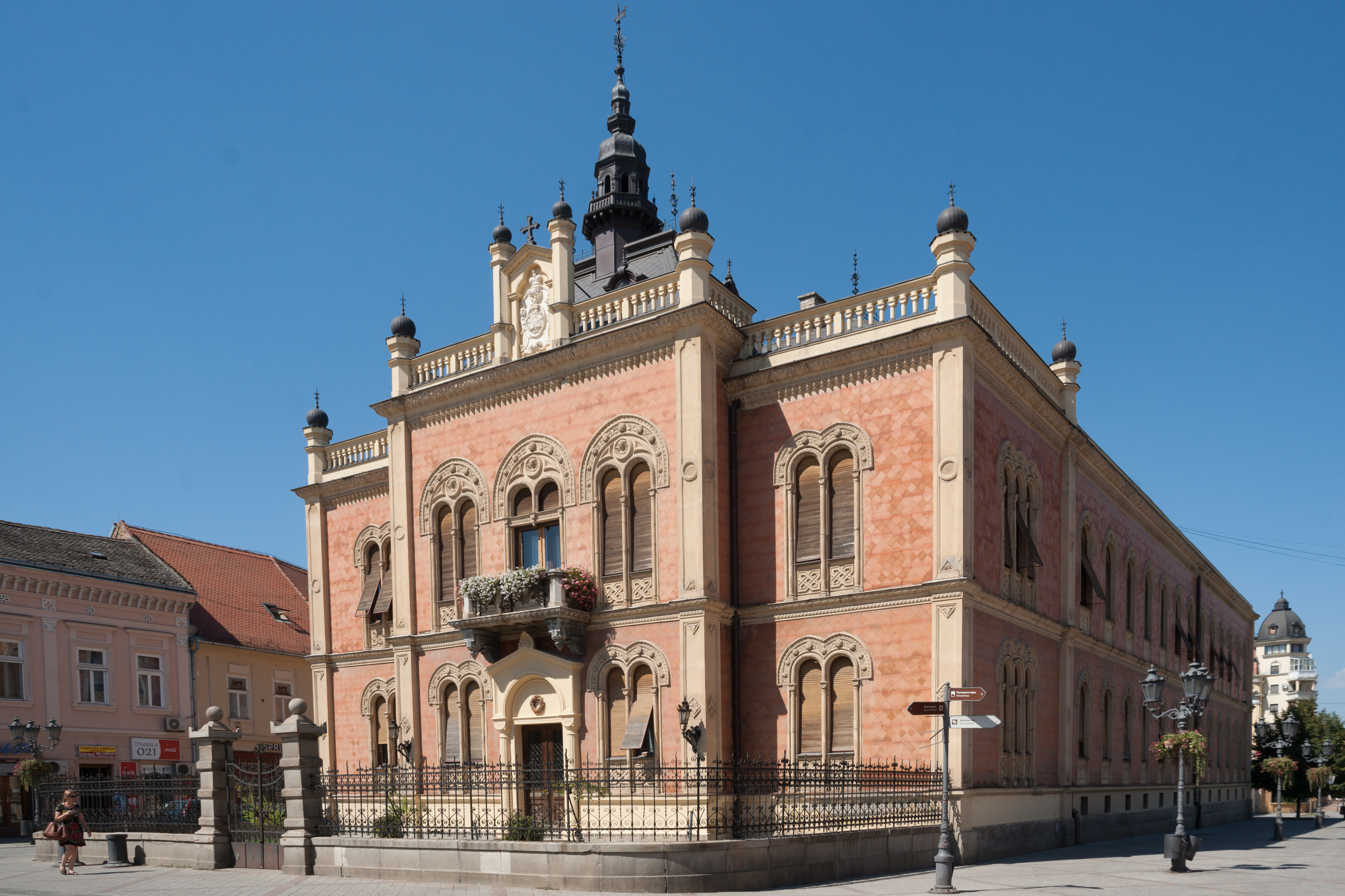 Vladičanski dvor, Novi Sad